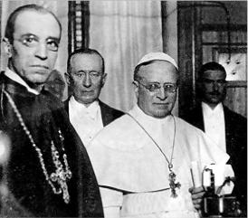 Pio XI junto a su sucesor, Eugenio Pacelli (Futuro Pio XII)